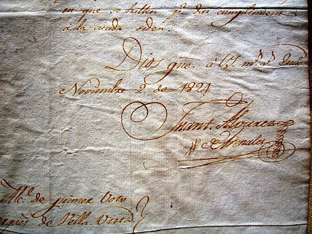 Firma de Juan Antonio Álvarez de Arenales